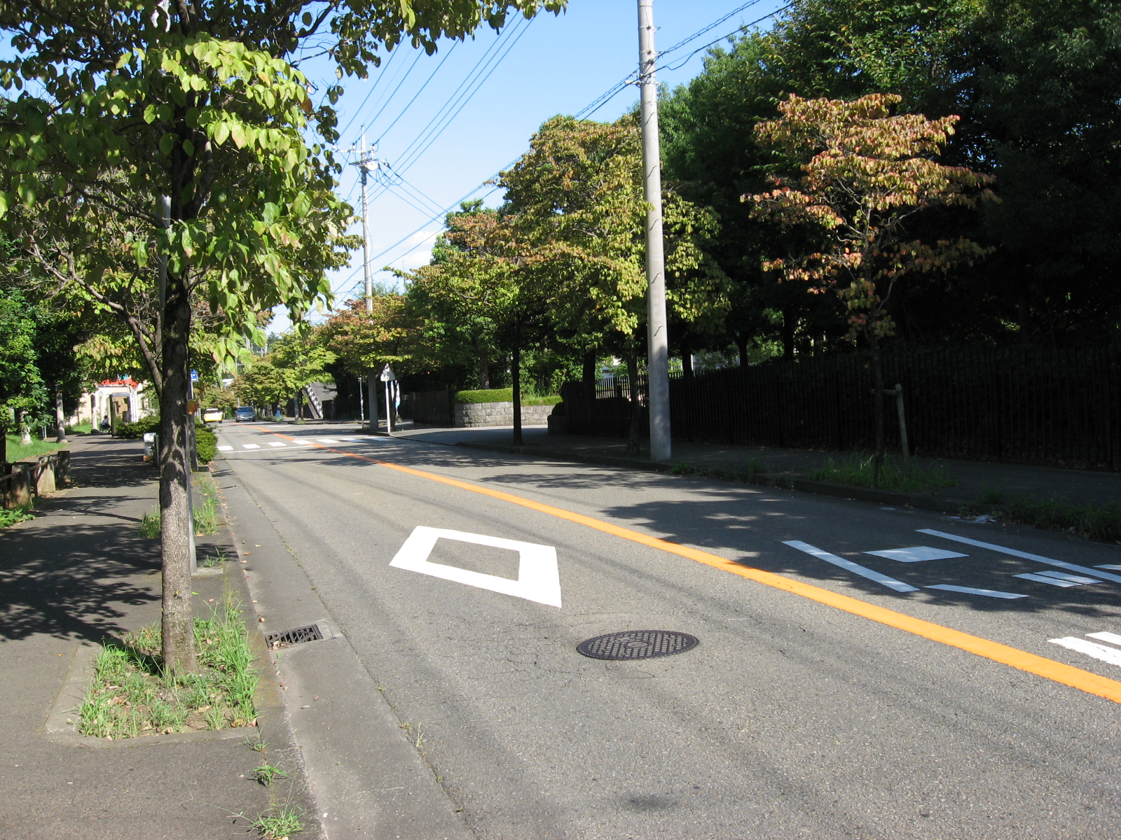 荏子田の風景